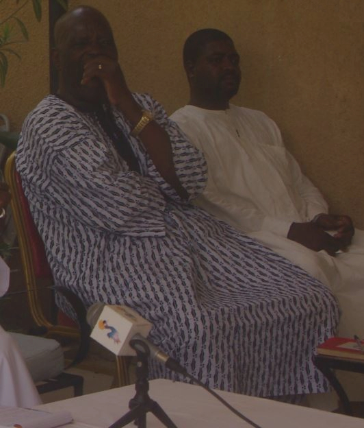 Conférence de presse de l'opposition. N J. D. Danadji, à N’Djamena, Tchad, 7 août 2016. (VOA/André Kodmadjingar)